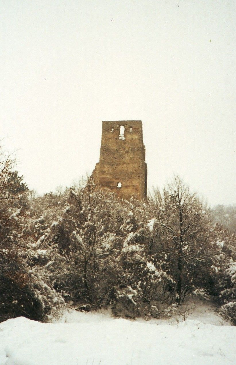 Almási vár - Romániában, Szilágy megyében, Váralmáson